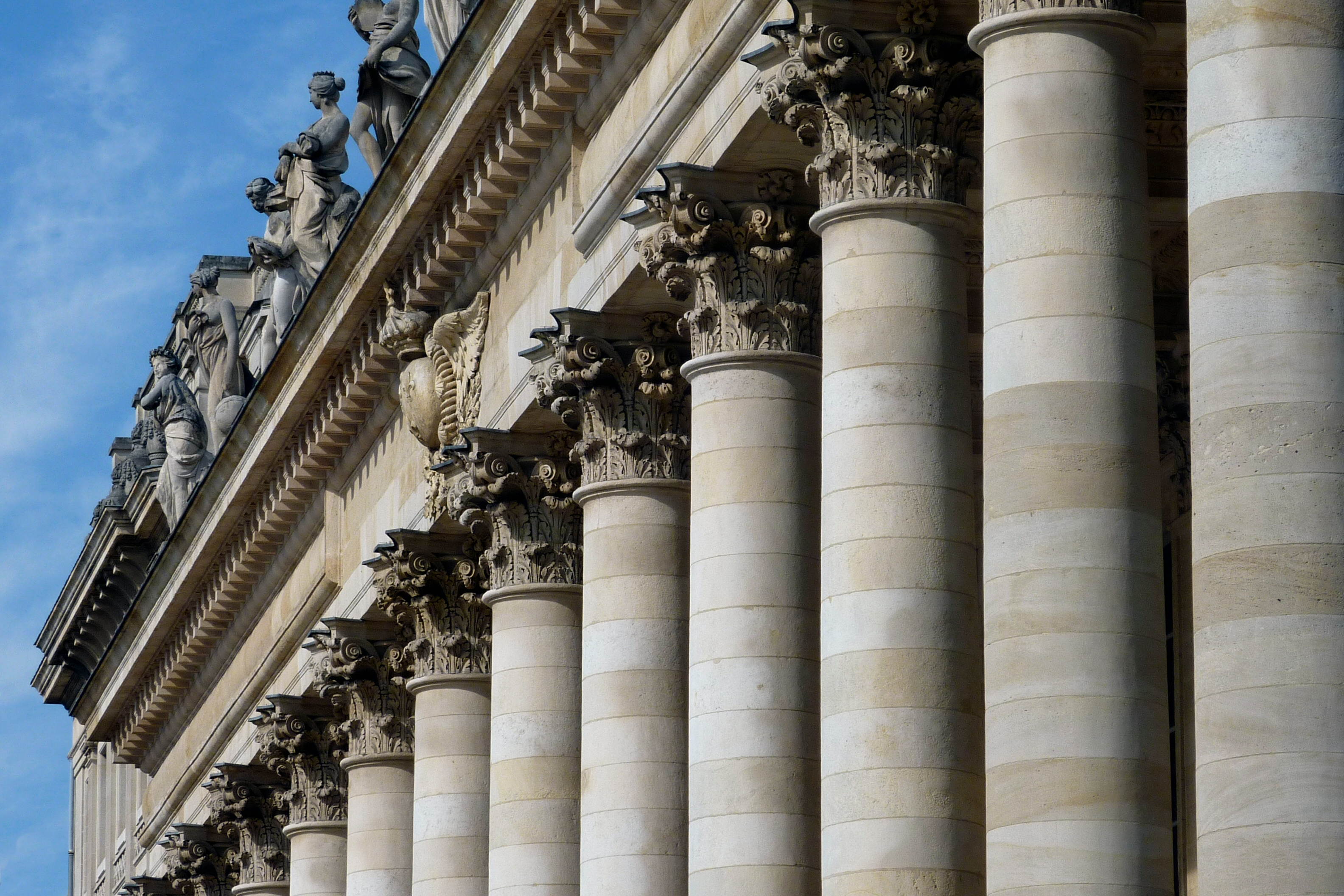 Grand Théâtre détail colonnes et statues Bordeaux Gironde France